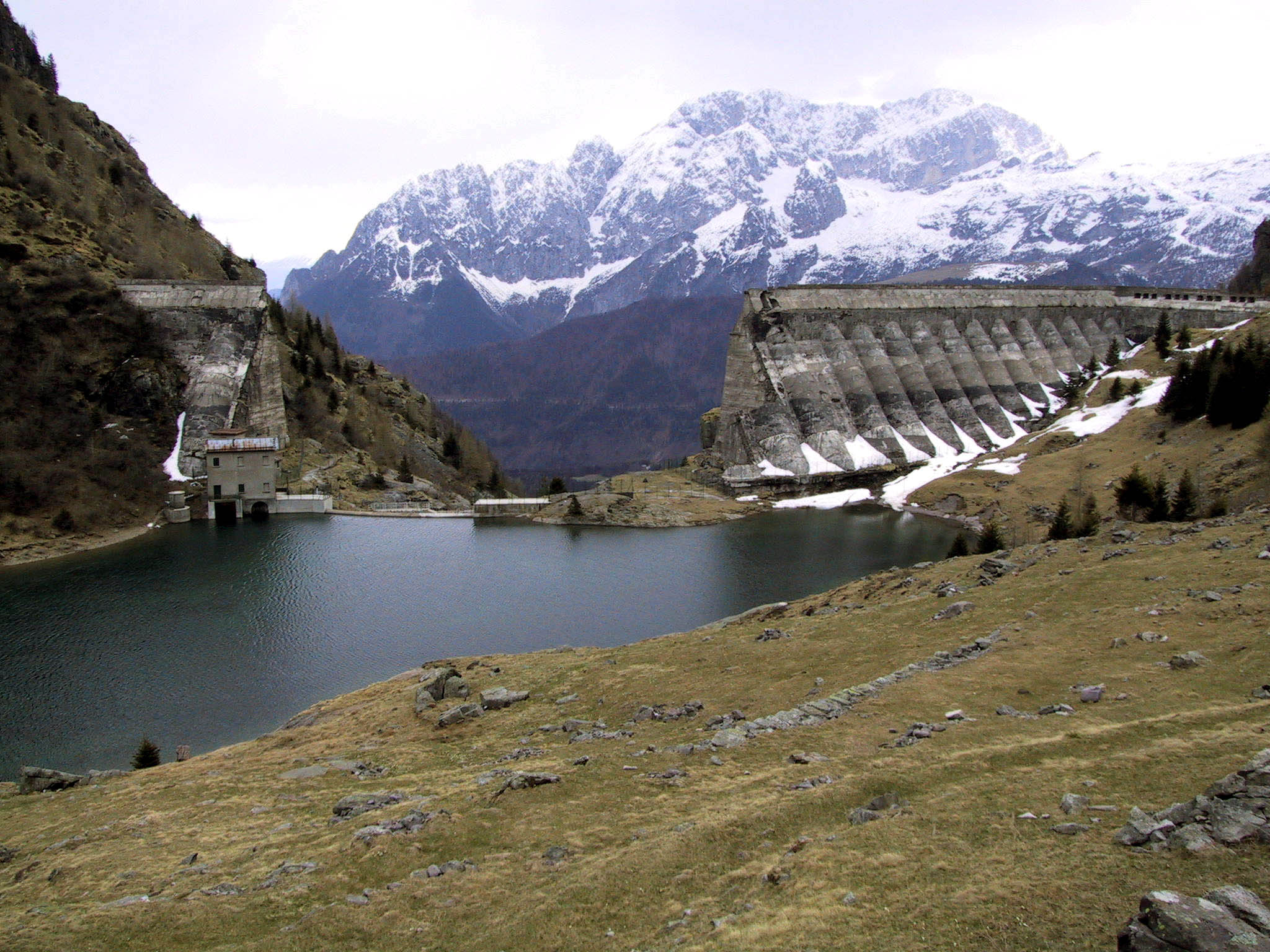 Diga del Gleno. Foto da me scattata durante escursione - aprile 2002. Immagine di pubblico dominio. Sullo sfondo il Pizzo della Presolana.